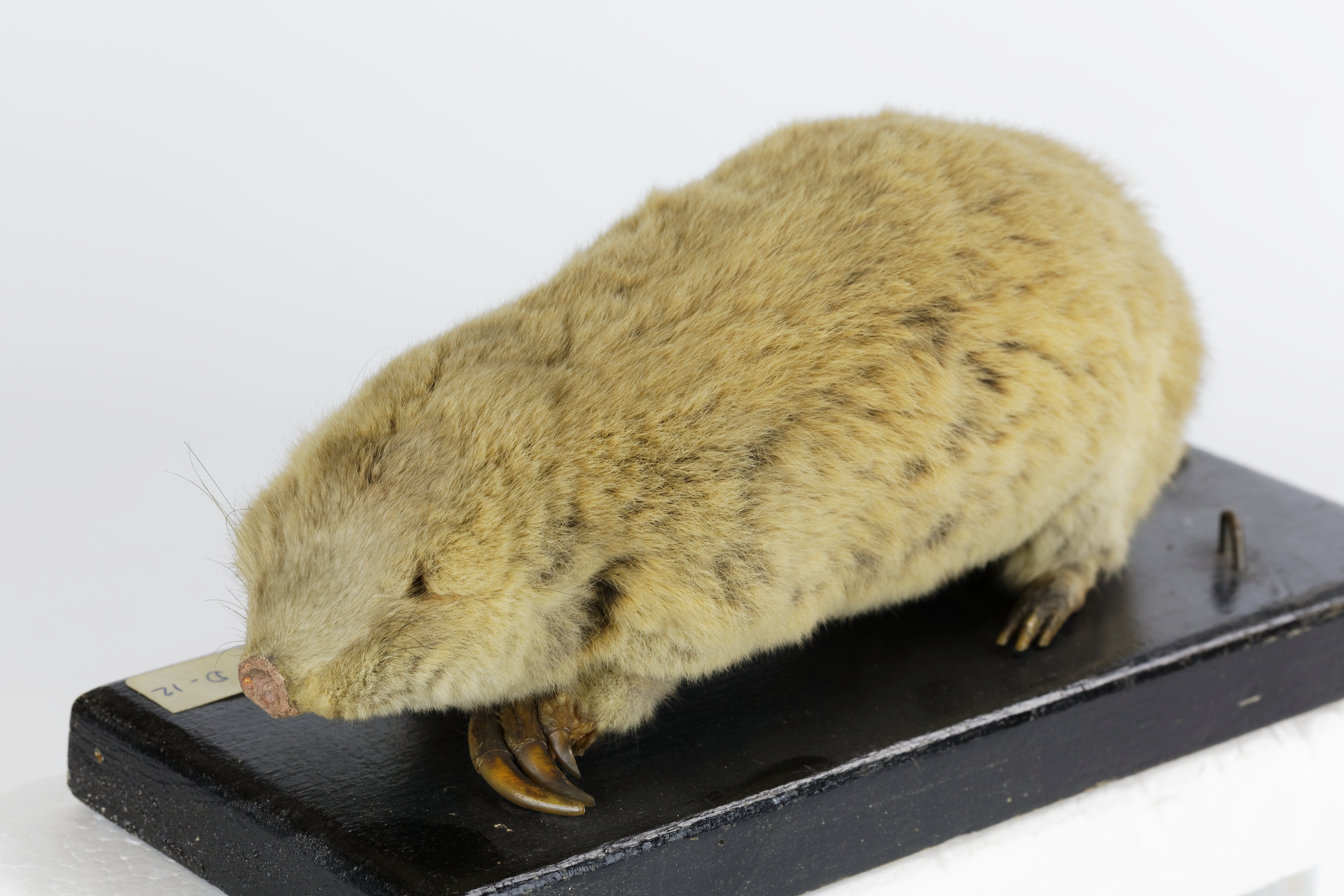 Nom vernaculaire Hamster-taupe ou Zokor Nom latin Myospalax sp./Myospalax cimandii ?(référence sur le socle) Nature du spécimen animal à la peau naturalisée Place dans le règne animal Chordé, Mammifère, Muridés Provenance Collection de Zoologie de l'Université Pierre et Marie Curie (UPMC) à Paris Dimensions du socle (cm) 20 (L) x 7,8 (l) x 1,6 (h) (bois) Longueur approximative du spécimen (cm) 19,5 (donnée non biométrique) (avec la queue) Hauteur totale du spécimen (cm) 8.4 (donnée non biométrique)